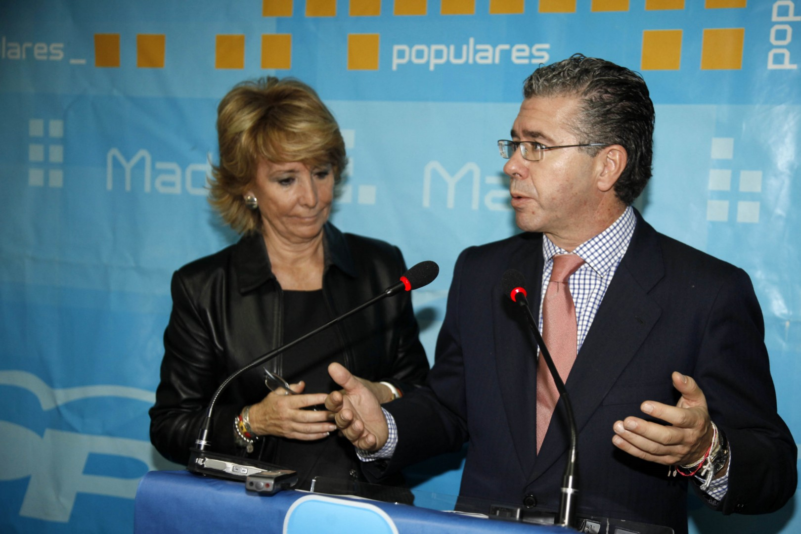 Comité Dirección en Aranjuez, 3 nov 2010